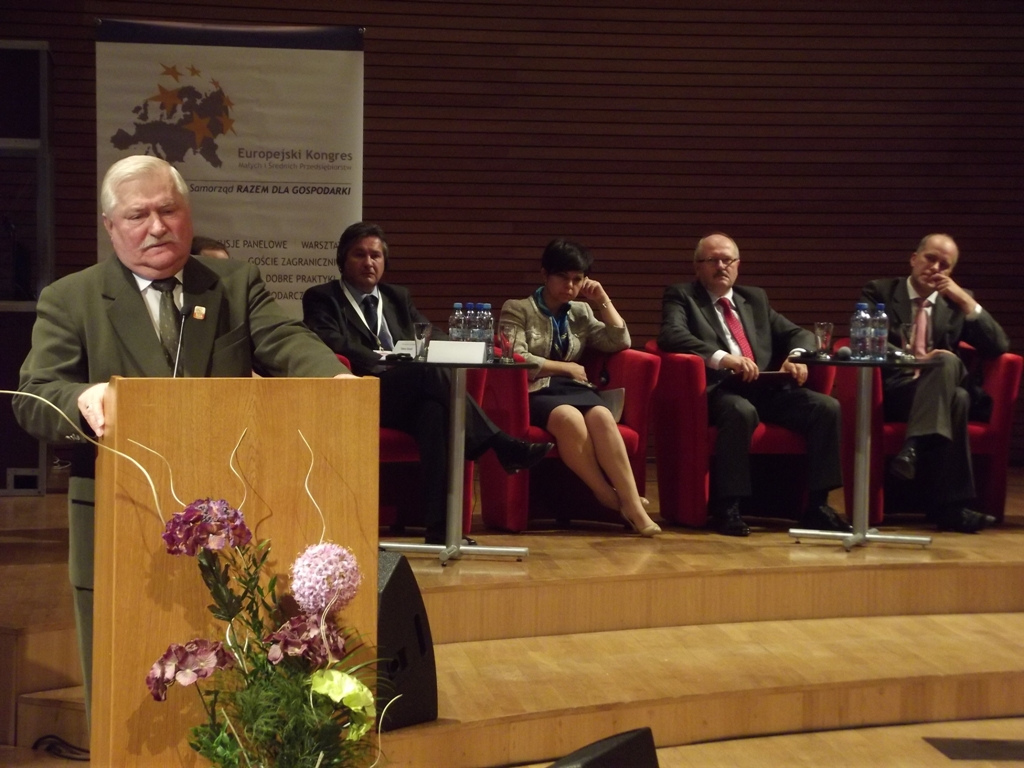 Zdjęcie zrobione podczas II Europejskiego Kongresu Małych i Średnich Przedsiębiorstw w Katowicach.